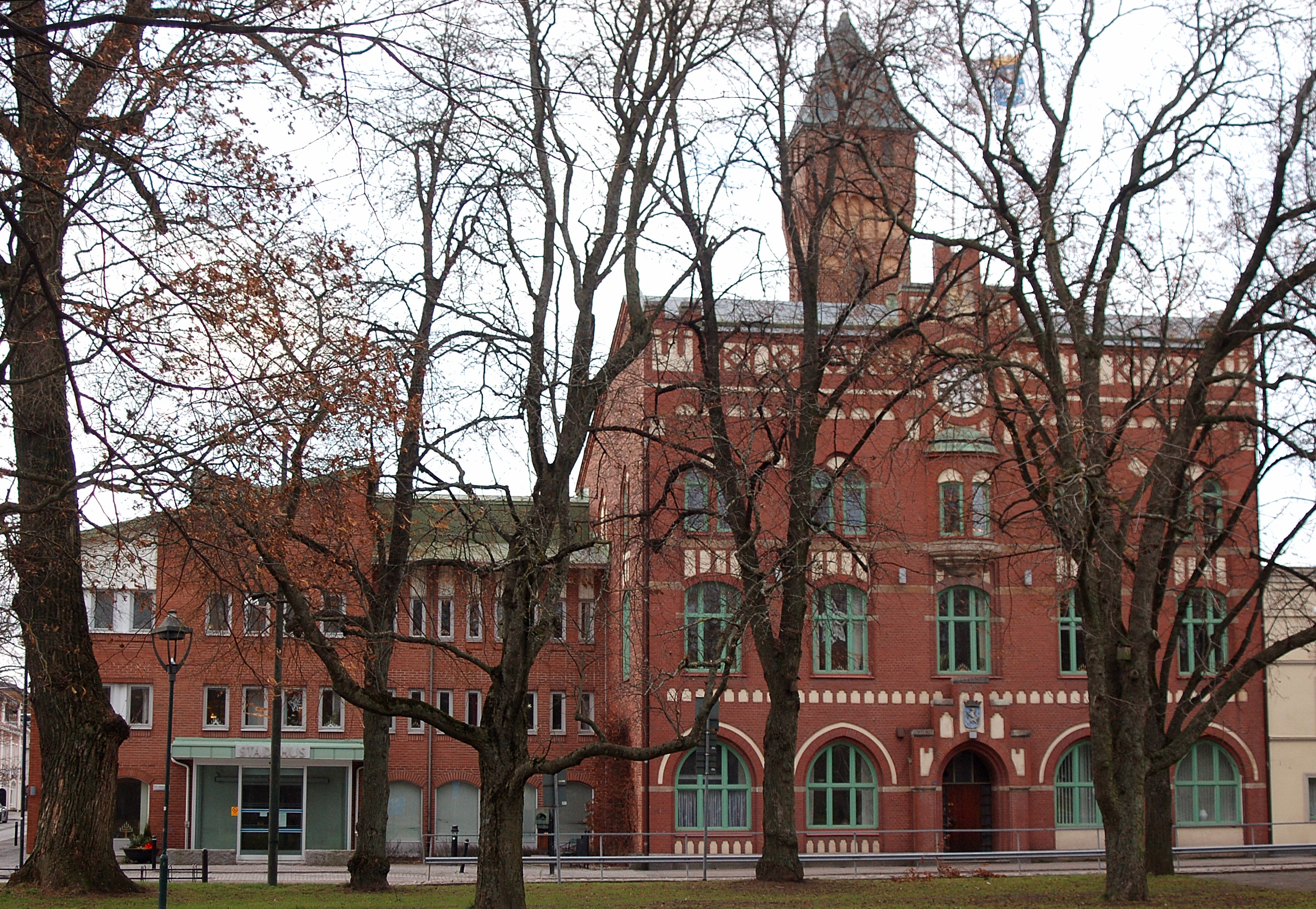 Arvika Stadshus äldre delen samt tillbyggnaden västerut.